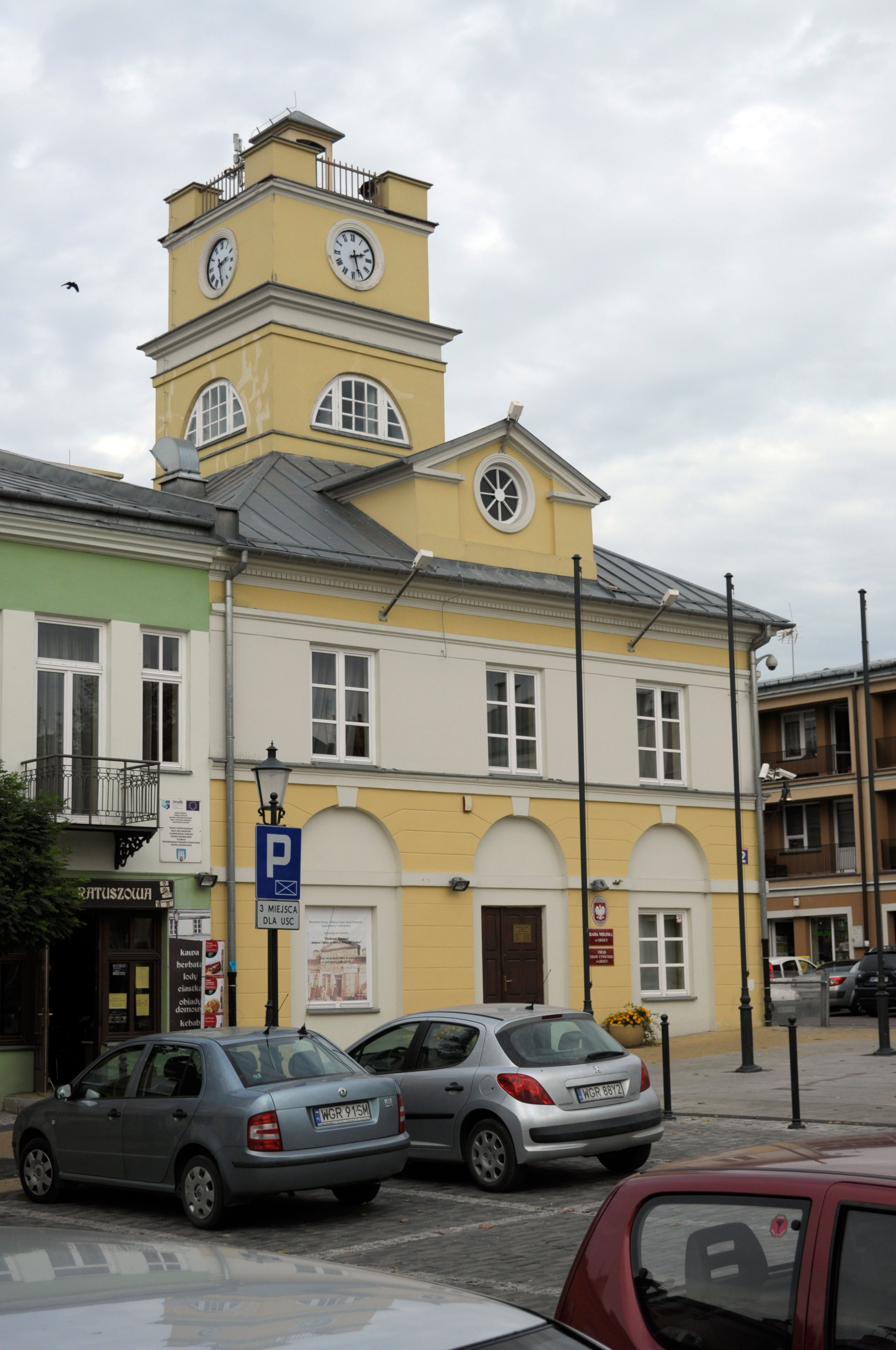 Grójec - ratusz, 1 poł. XIX (zabytek nr 473/A/62 oraz 131/A)